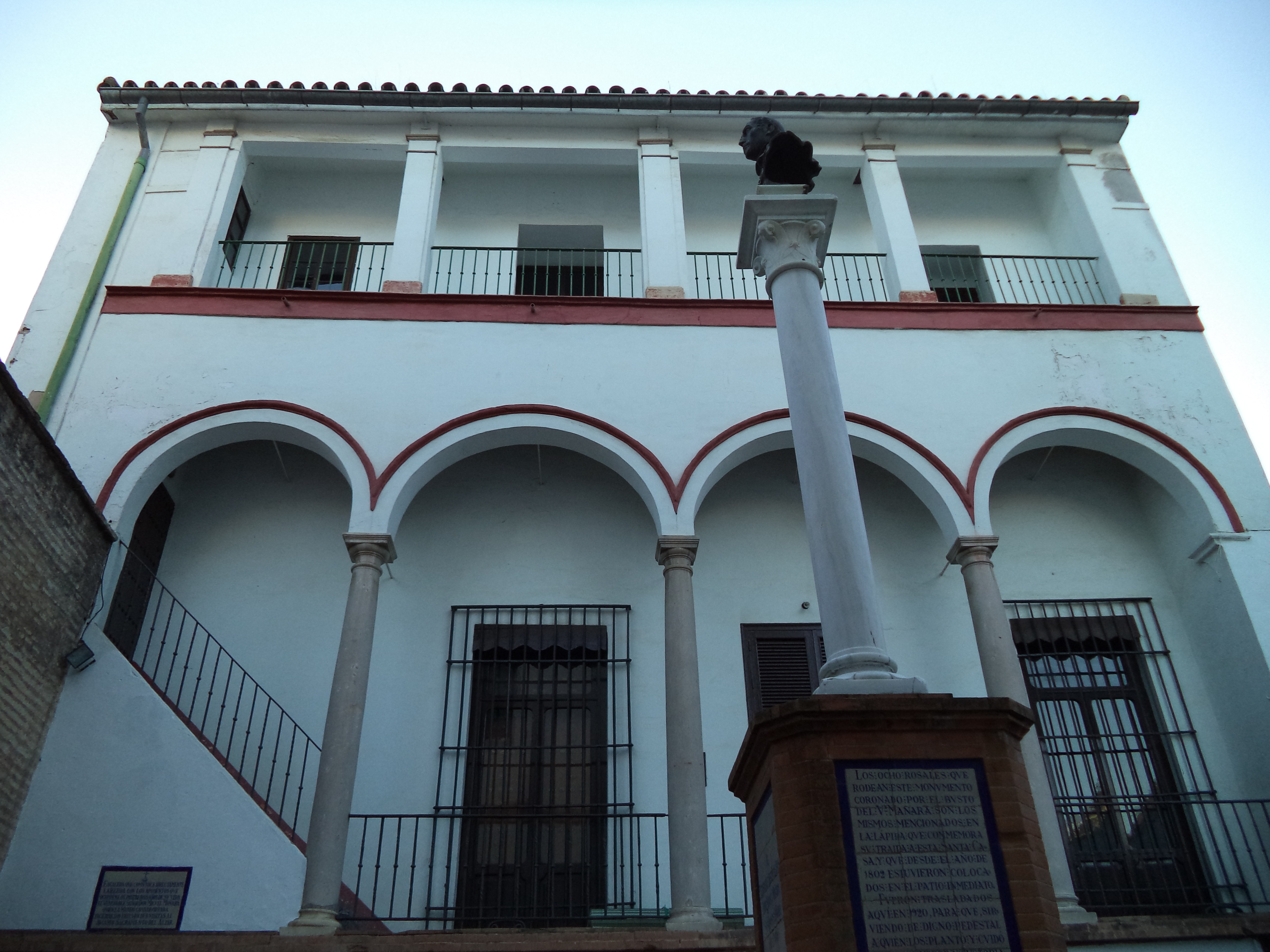 Un edificio de la Santa Caridad. Una placa explica que esa escalera comunica directamente la Iglesia con los aposentos que ocupó en los últimos años de su vida Miguel de Mañara. Este mandó construirla para facilitar sus visitas al "augusto sacramento del Altar". En la plaza se encuentra un monumento de 1920 que consiste en una columna coronada por un busto de bronce del venerable.